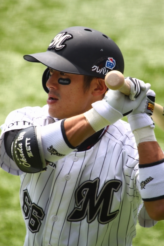 日本プロ野球 千葉ロッテマリーンズ 岡田幸文 外野手